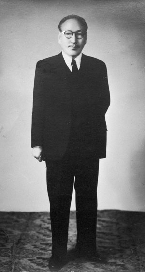 한국의 독립운동가,통일운동가 조소앙 선생.